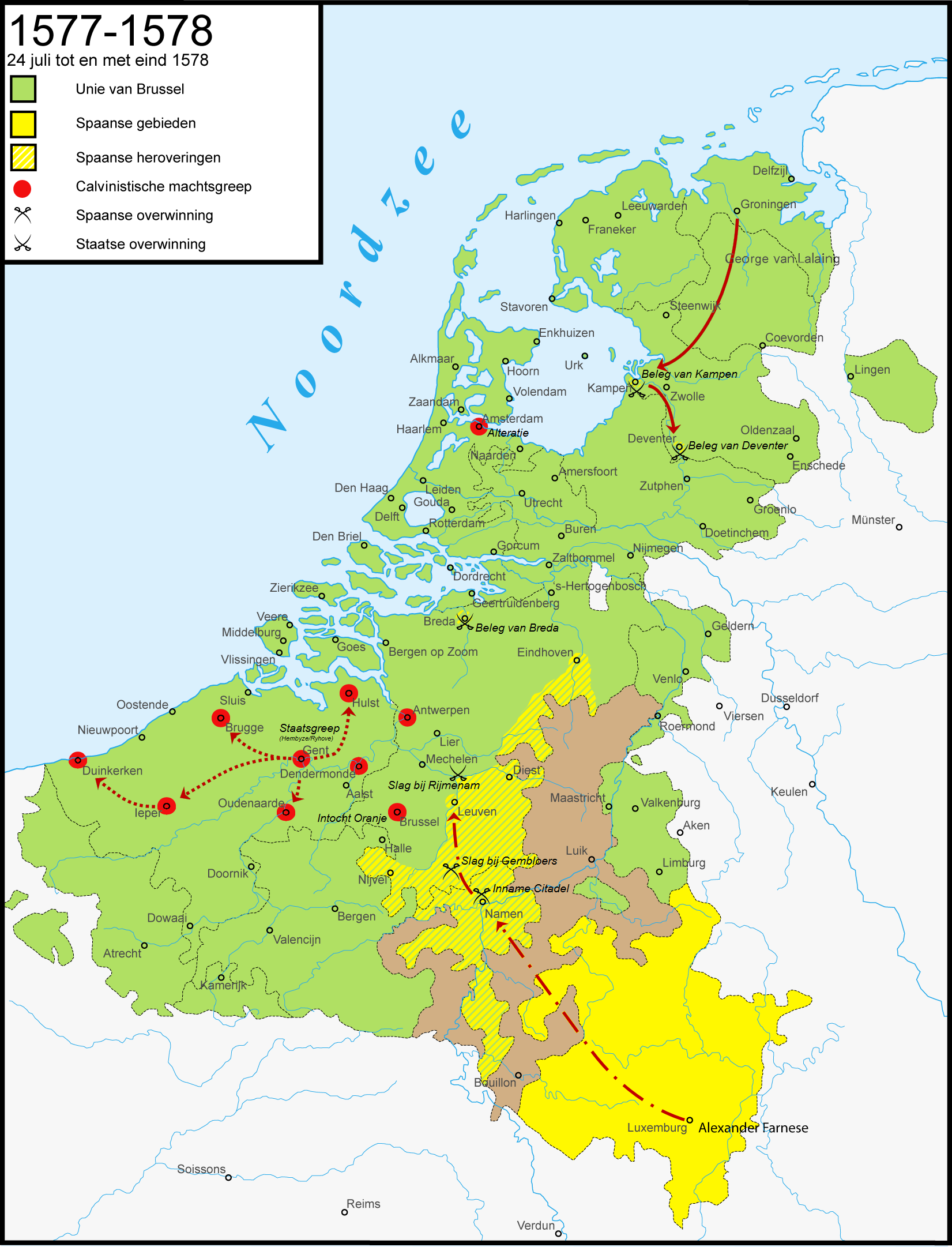 Krijgsbewegingen in de Tachtigjarige Oorlog: 24 juli 1577 tot en met eind 1578. Nederlandse versie Engels: Warprogression in het Eighty Years' War: 24th July 1577 till the end of 1578. Dutch version